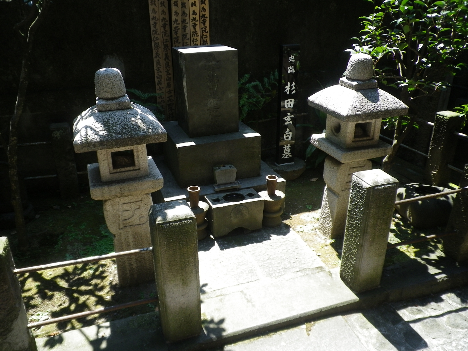 杉田玄白の墓